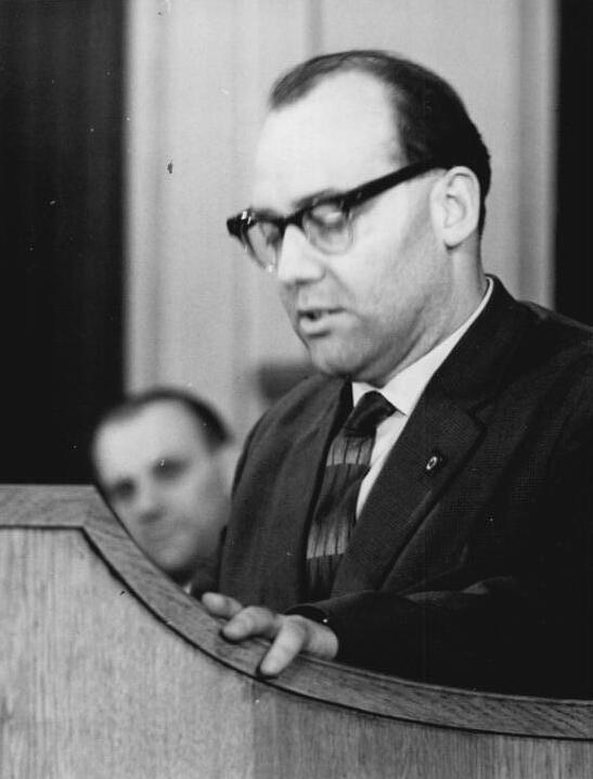 Zentralbild/Junge 28.3.1962 Volkskammer der DDR berät Volkswirtschaftsplan und Staatshaushaltsplan 1962 - Dr. Lothar Bolz gibt aussenpolitische Erklärung ab Die Volkskammer der Deutschen Demokratischen Republik trat am 28.3.1962 zu ihrer 22. Sitzung zusammen. Zu Beginn gab der Minister für Auswärtige Angelegenheiten, Dr. Lothar Bolz, eine Erklärung zu aussenpolitischen Fragen ab. Im Mittelpunkt der Volkskammersitzung stehen die erste und zweite Lesung des Beschlusses der Volkskammer über den Volkswirtschaftsplan 1962 und des Gesetztes über den Staatshaushaltsplan 1962. UBz.: Als Berichterstatter des Haushalts- und Finanzausschusses der Volkskammer spricht der Abgeordnete Karl-Heinz Schulmeister.